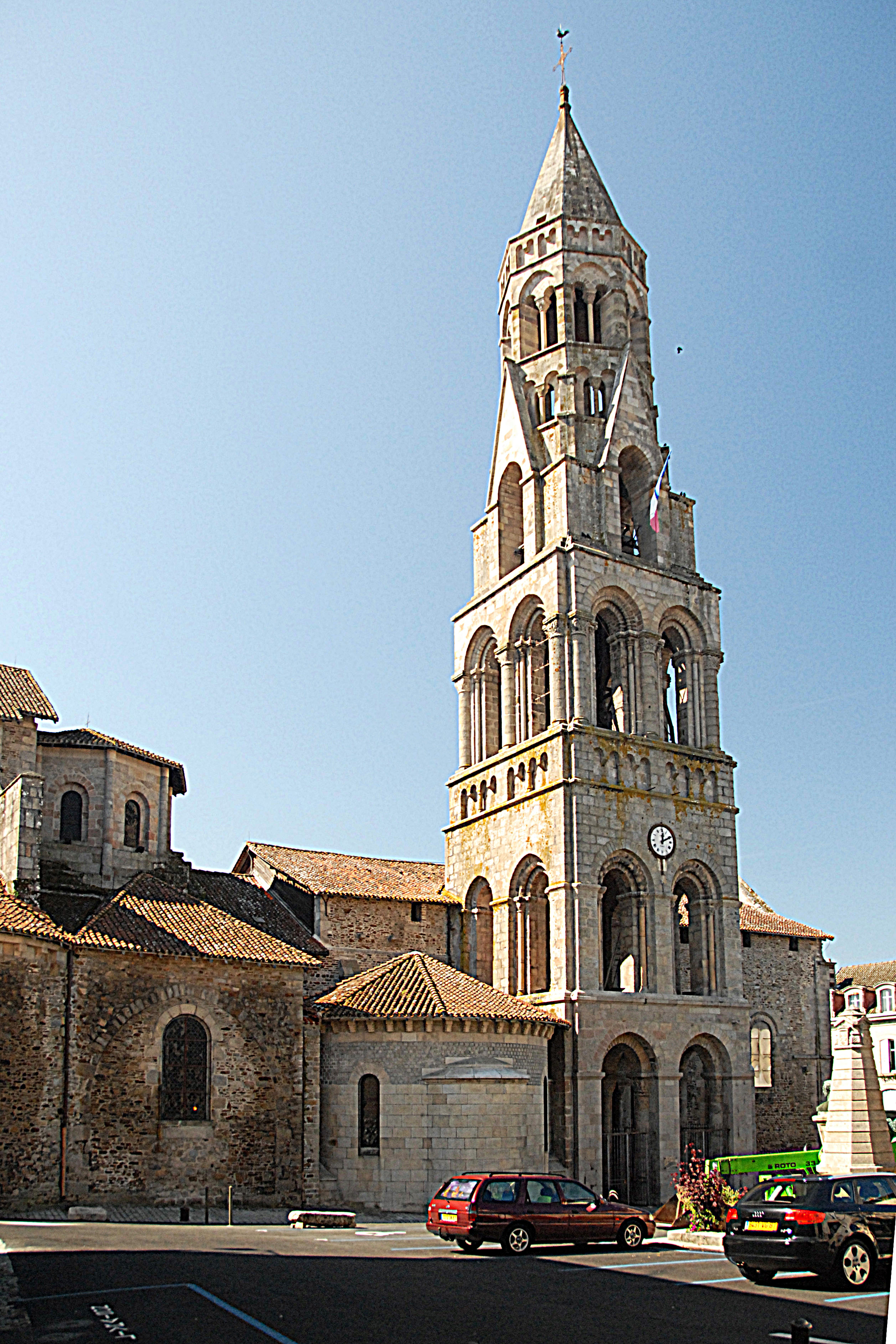 Stiftskirche St.-Léonard-de-Noblat, von N, Querhaus Langhausu. Turm